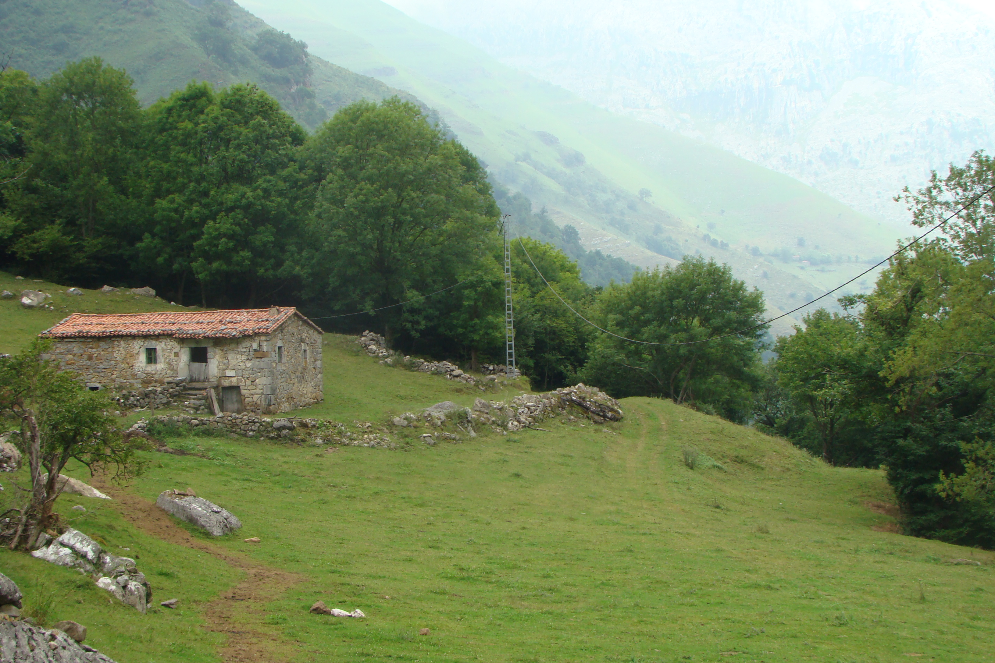 Vista del valle delrío Asón